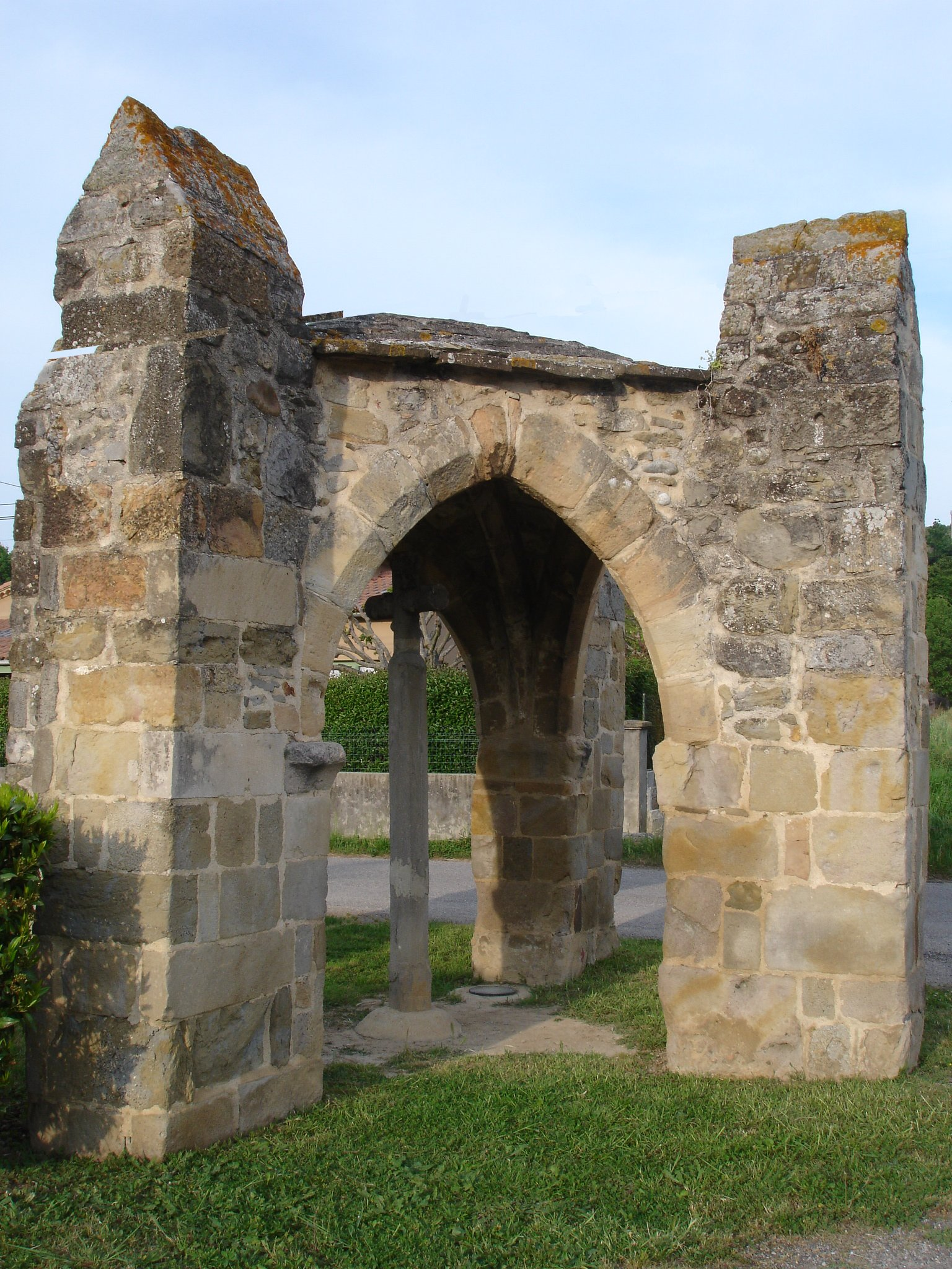 France, Pieusse, Aude (11), oratoire